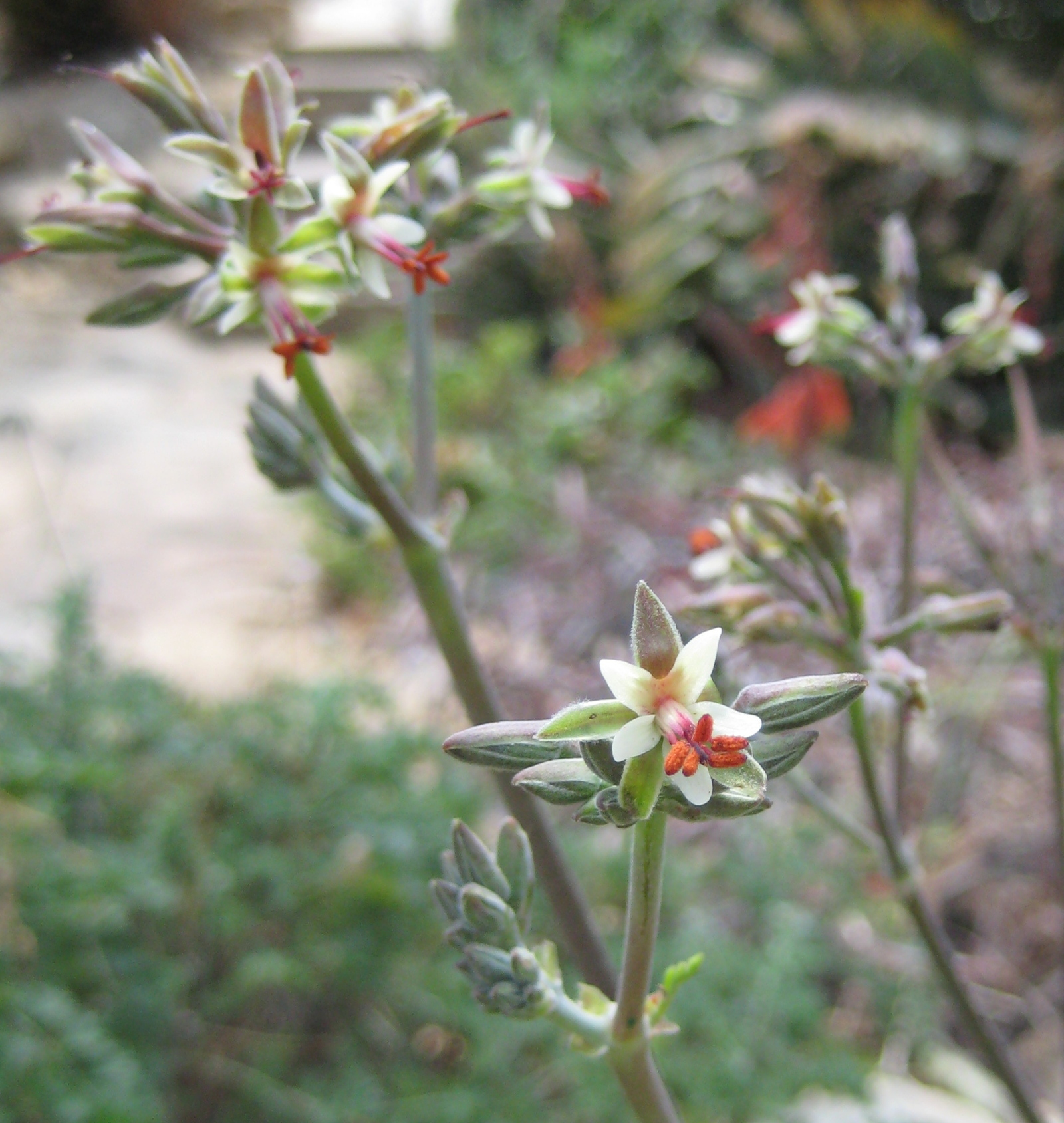 Pelargonium dasyphyllum im Botanischen Garten Dresden